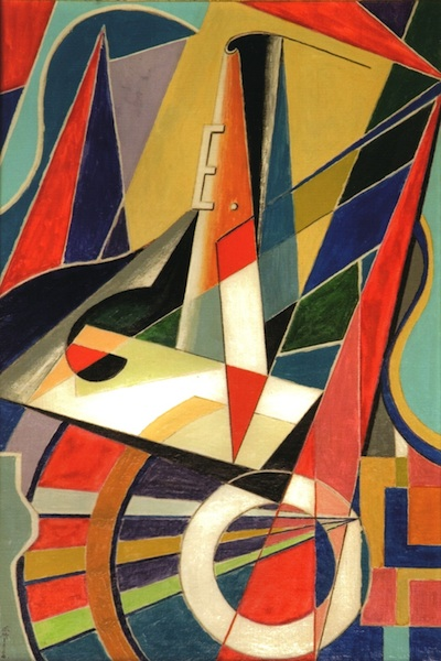 Lettera E di Enzo Mainardi, tempera vetrificata su cartone telato (Collezione privata)